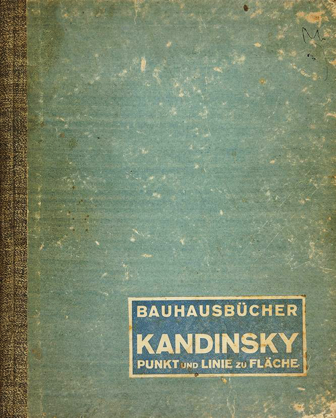 Точка и линия на плоскости - 1926